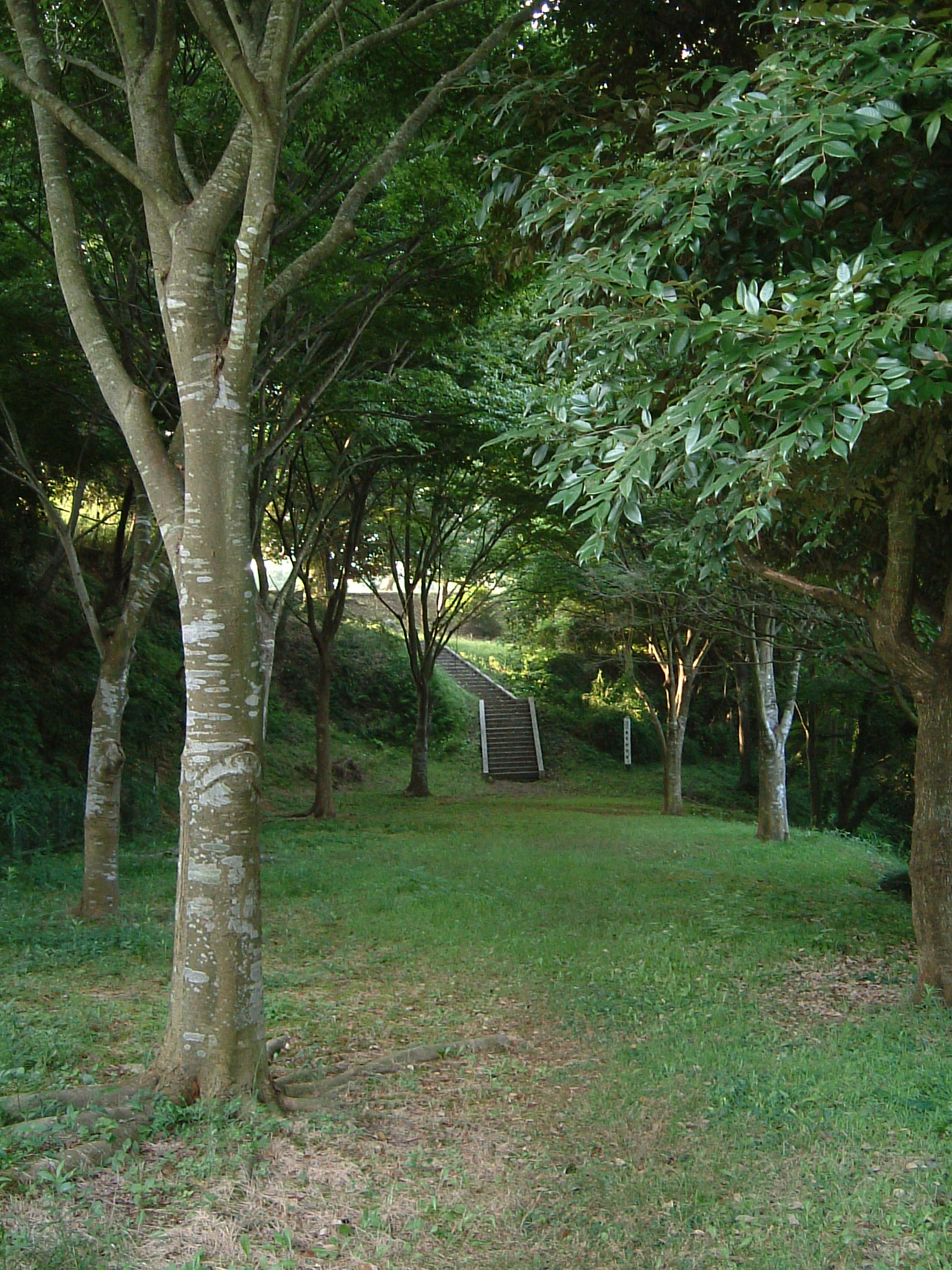 a kitchen midden Minamikouya Hitachi City Ibaraki Pref Japan 南高野史跡公園 (南高野貝塚)